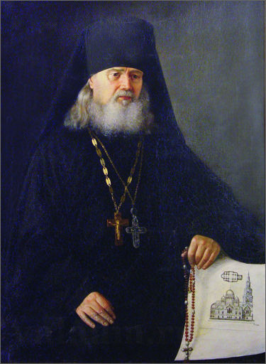 Ионафан Дмитриев (в миру Иван (Иоанн); 1816—1891) — игумен ставропигиального Валаамского Спасо-Преображенского мужского монастыря Русской православной церкви и духовный писатель.